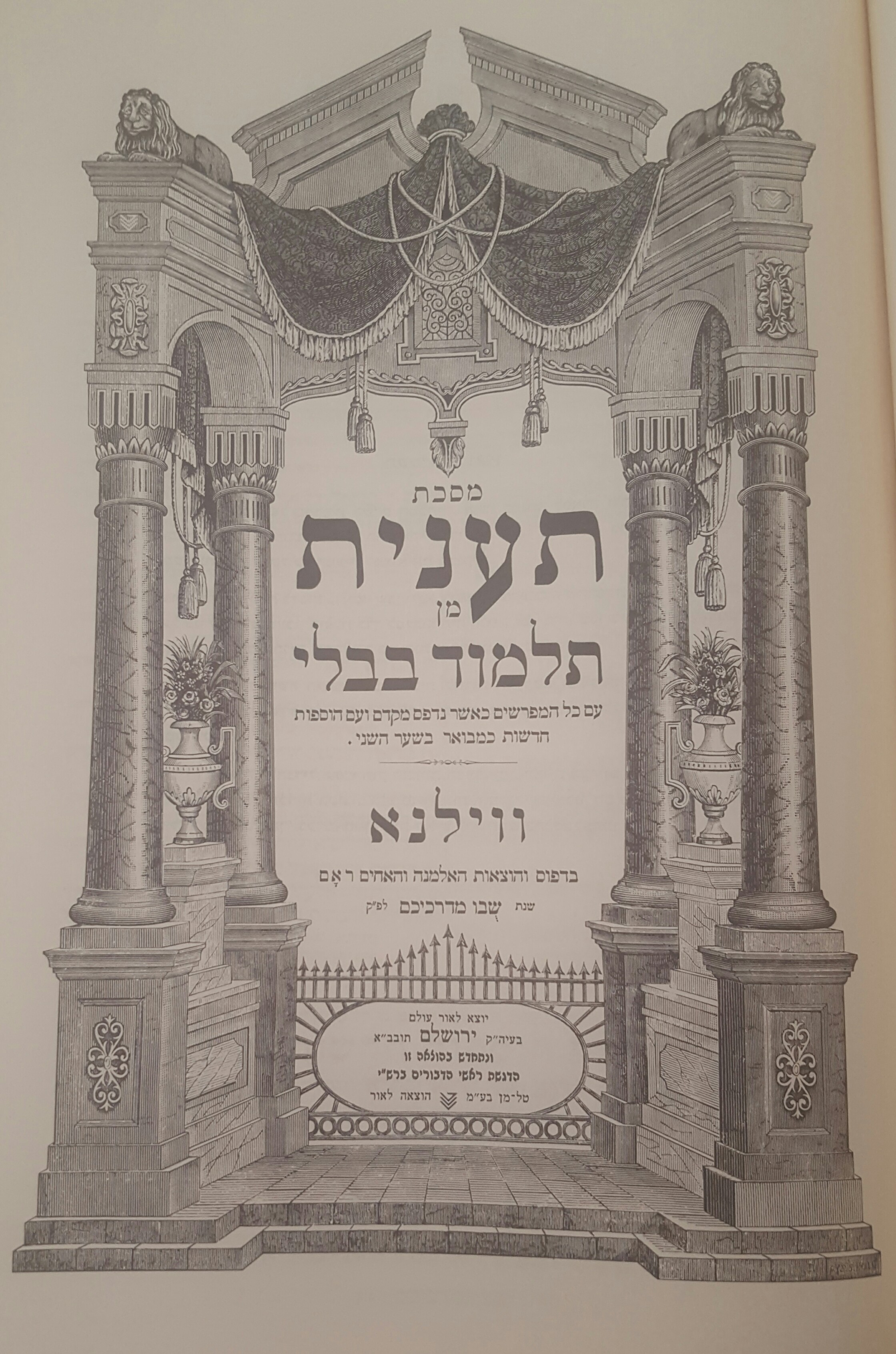 דף השער של מסכת תענית, מתוך דפוס וילנא